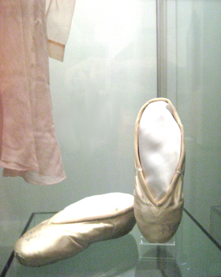 пуанты Г.С. Улановой к роли Джульетты из балета С. ПРокофьева "Ромео и Джульетта" (1958). Музей: Государственный Академический Большой театр